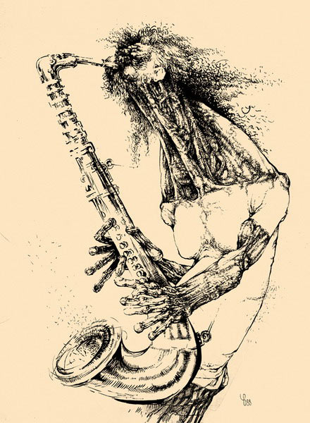 ДЖАЗ (из серии «Музыка»). Бумага тонированная, кисть, перо, тушь, 55×70 см. 1988 г.